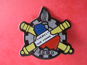 Insigne de l'Établissement de Réserve Générale de Munitions de Chemilly sur yonne.